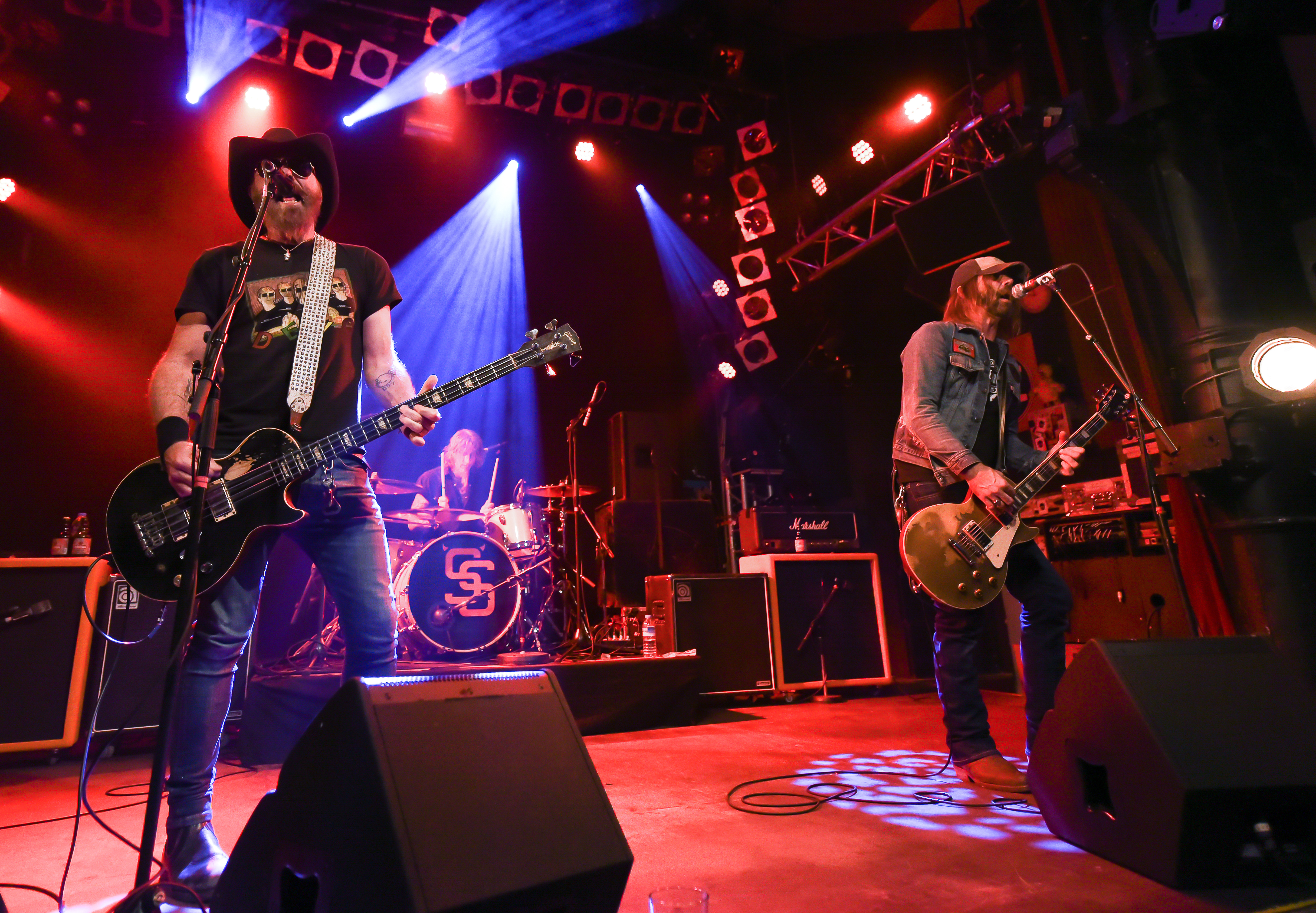 Supersucker beim Metal Monday 2017